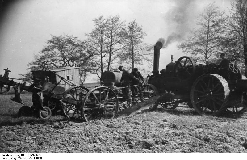 Oderbruch, Frühjahrsbestellung, Einsatz einer Lokomobile Illus-Heilig 26.4.48 Im Oderbruch wird gearbeitet. Aufnahmen von der Frühjahrsbestellung 1948 im Kreis Lebus. U.B.z.: Der Dampf singt in dem Kessel der Lokomobile. Ein Pfeifsignal - gleich wird sich der schwere Dampfpflug in Bewegung setzen. 1423-48